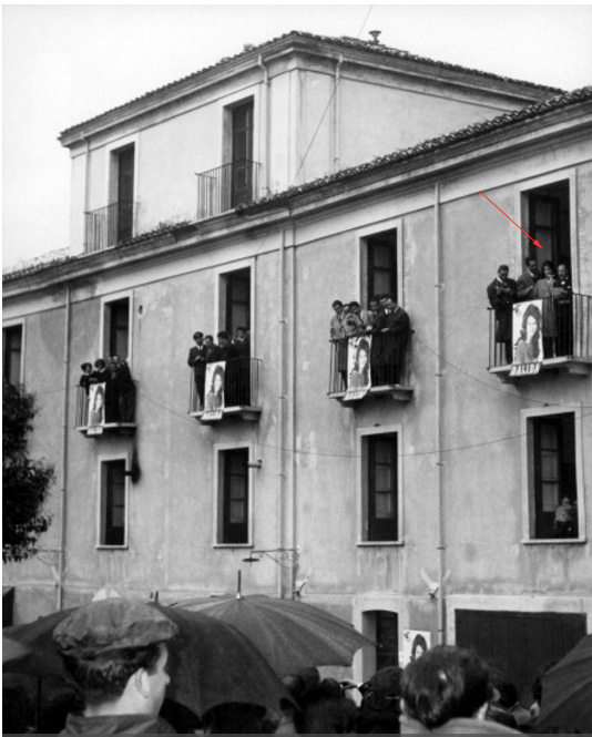 Accueil de Dalida en 1962.